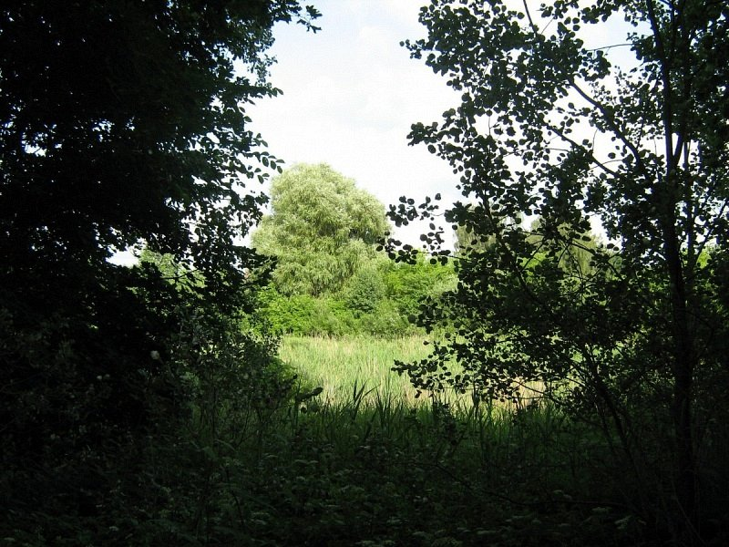 Вердамічы. Парк саўгаса «Вердамічы»